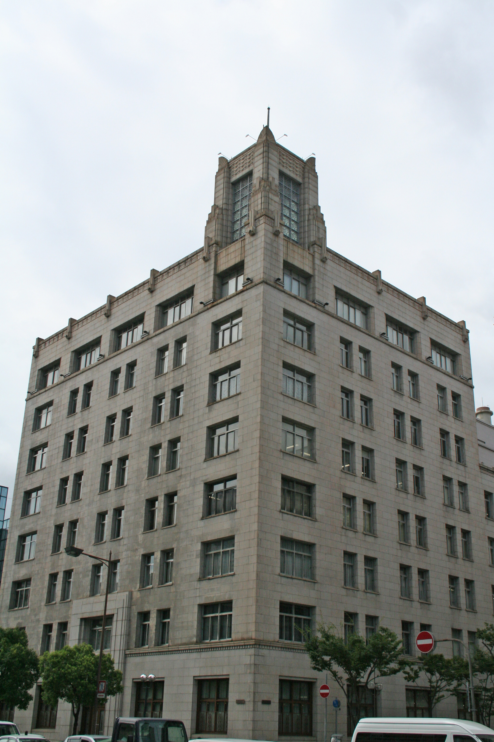 兵庫県神戸市中央区にある神戸市立博物館やその南を通る国道2号線(海岸通)沿いの町並み。 神港ビルヂング。